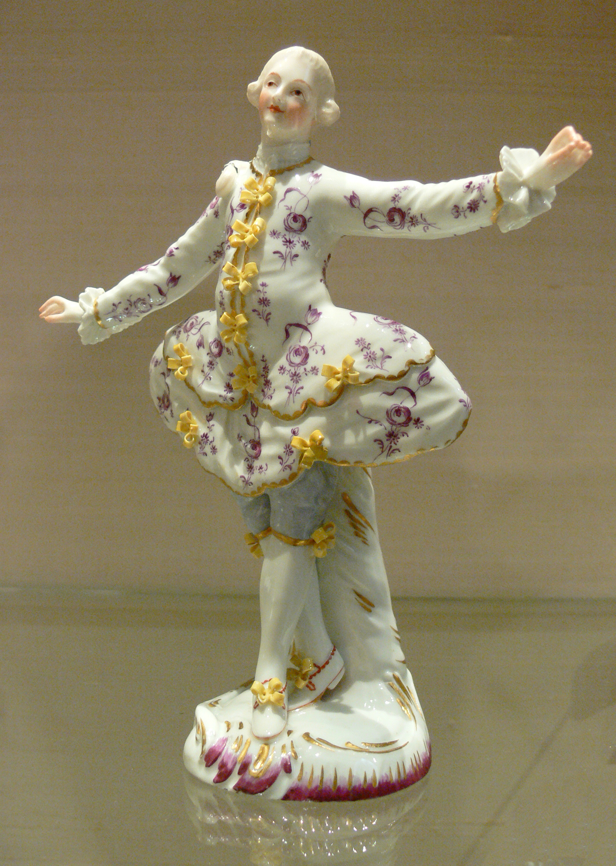 Tänzer, Teil von: Tänzerpaar, Porzellan (Muffel-Technik), Modell: evtl. Johann Friedrich Lück; Marke: sechsspeichiges Rad (rot); Höchst, um 1755 Gallery: Reiss-Engelhorn-Museen, Mannheim